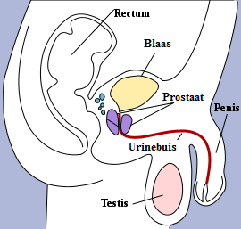 Doorsnede van de menselijke penis met uitleg van de onderdelen.